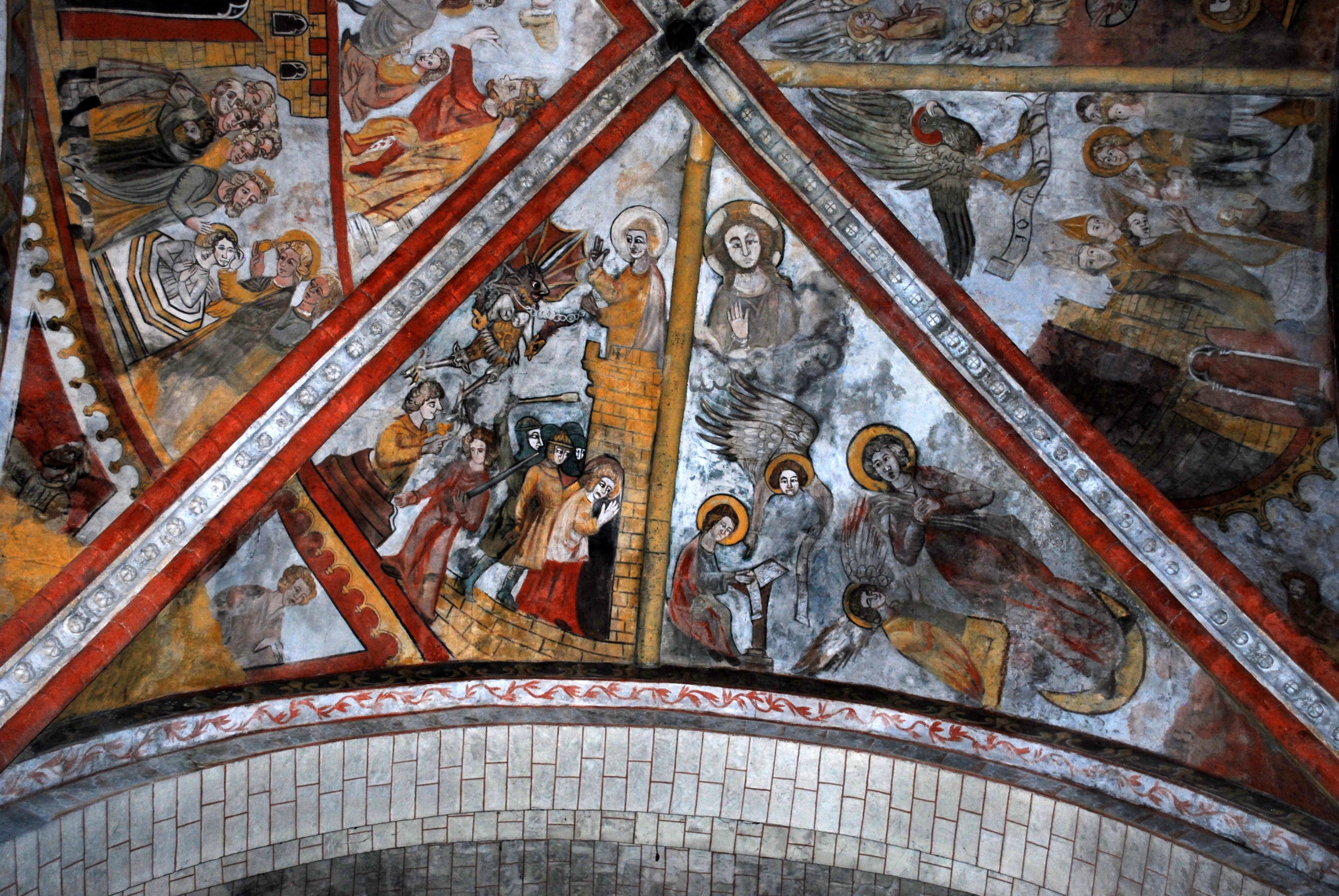 Saint-Macaire église peintures gothiques